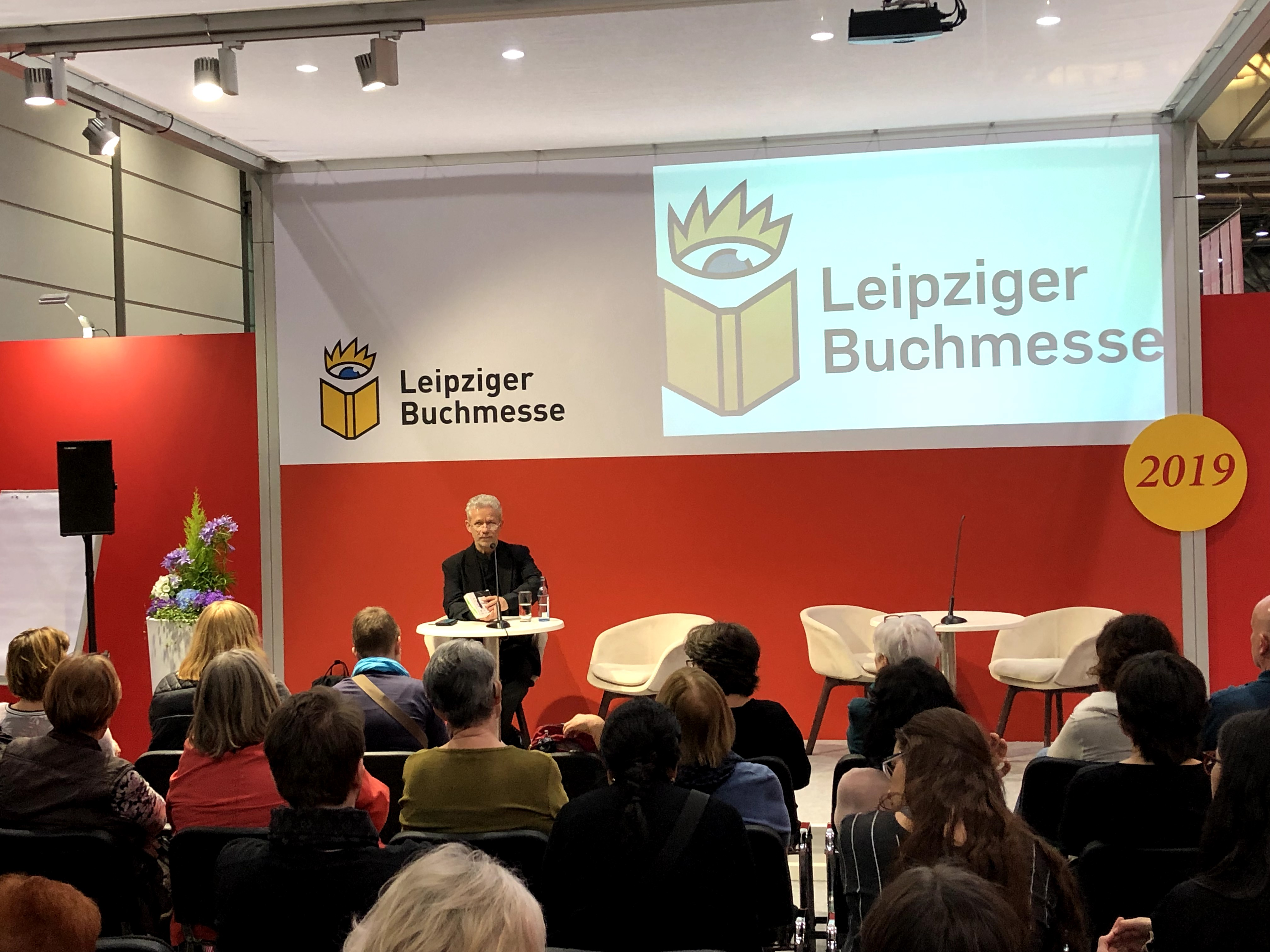 Bernd Hesse bei seiner Lesung zu "Durch die Hölle - Wahre Kriminalfälle" auf der Leipziger Buchmesse 2019